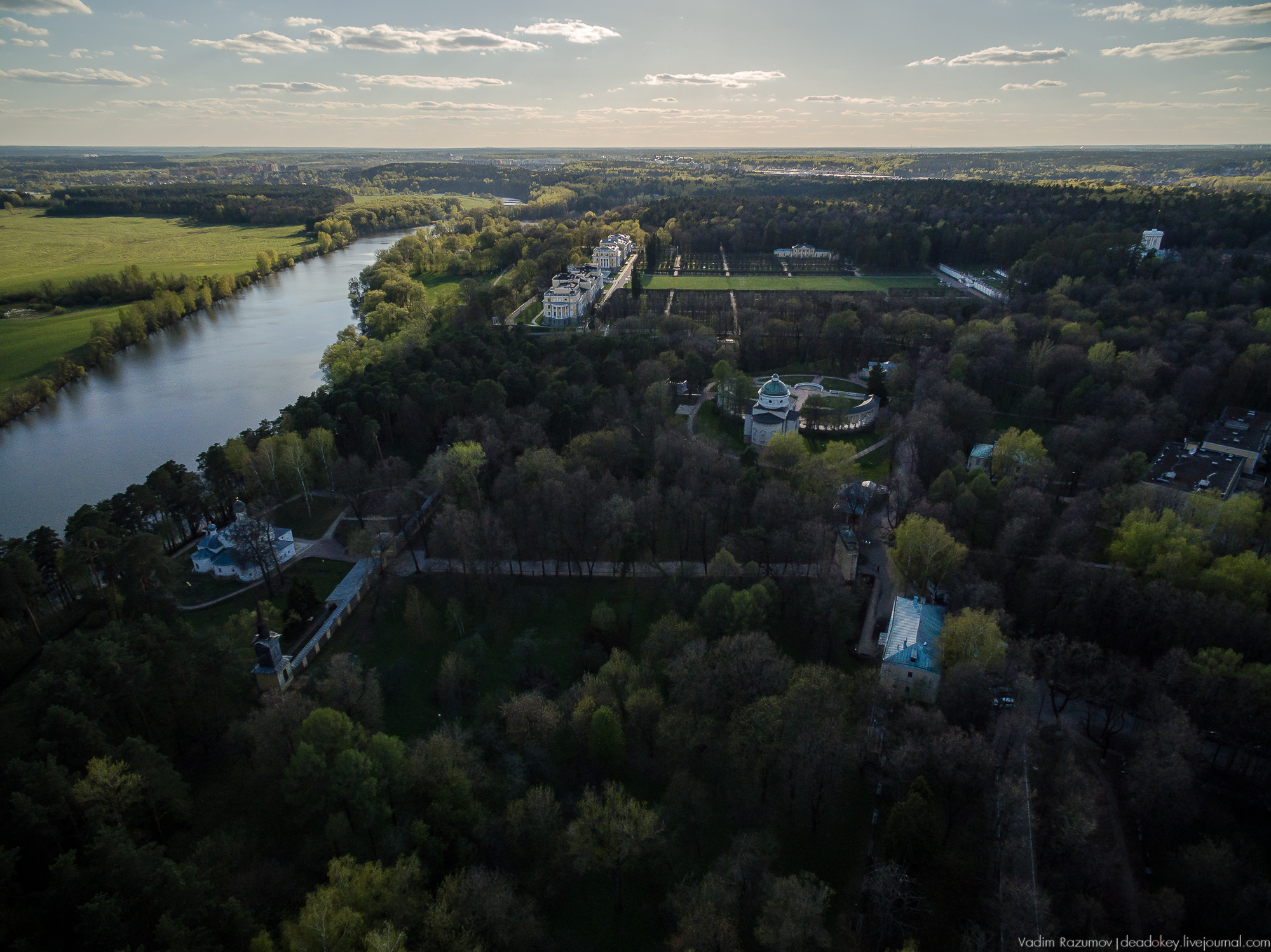 Усадьба Архангельское.